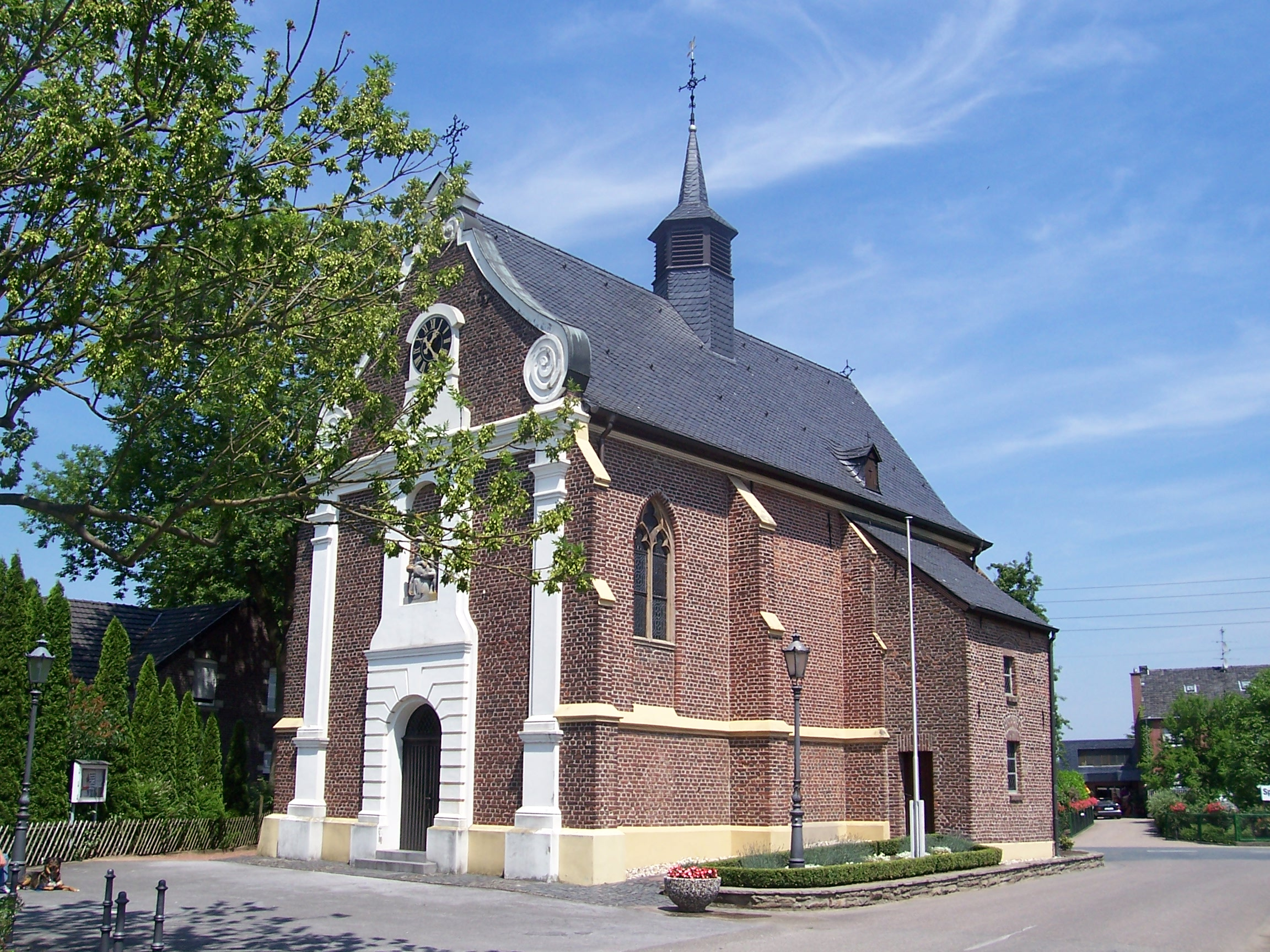 Pilgrimage church in Aengenesch, Geldern, Germany